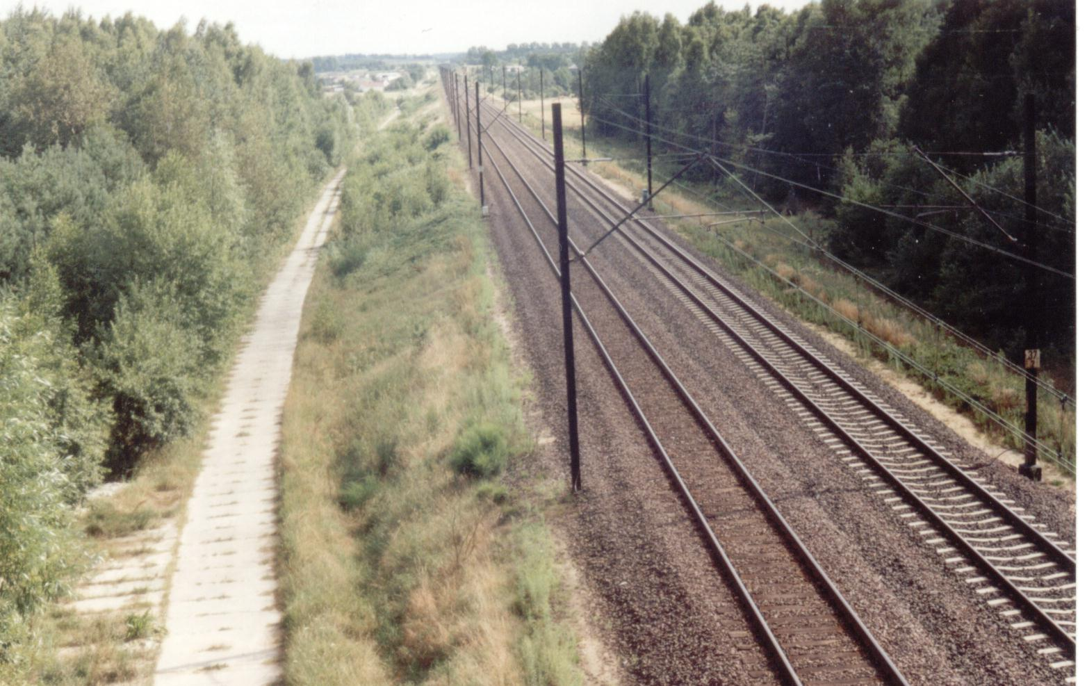 Widok na linię kolejową z wiaduktu koło Chrząszczewa